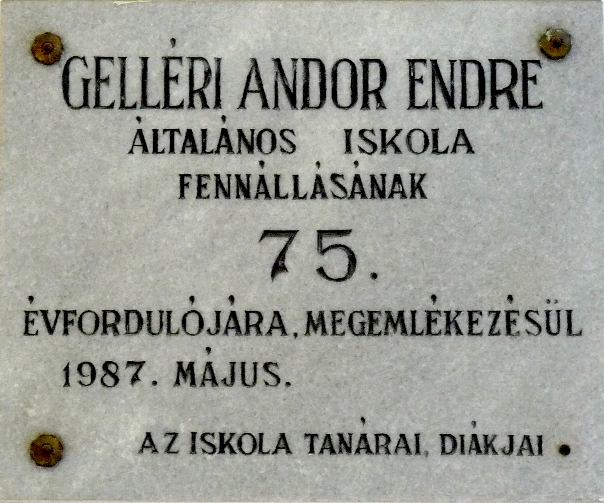 A Gelléri Andor Endre (1906-1945) magyar író, novellista nevét egykor viselt általános iskola fennállásának 75. évfordulóján felavatott tábla, a bejárati boltív alatt. Az épület ma az Óbudai Egyetem Kiscelli utcai épülete. Budapest, III. ker. Kiscelli utca 78.